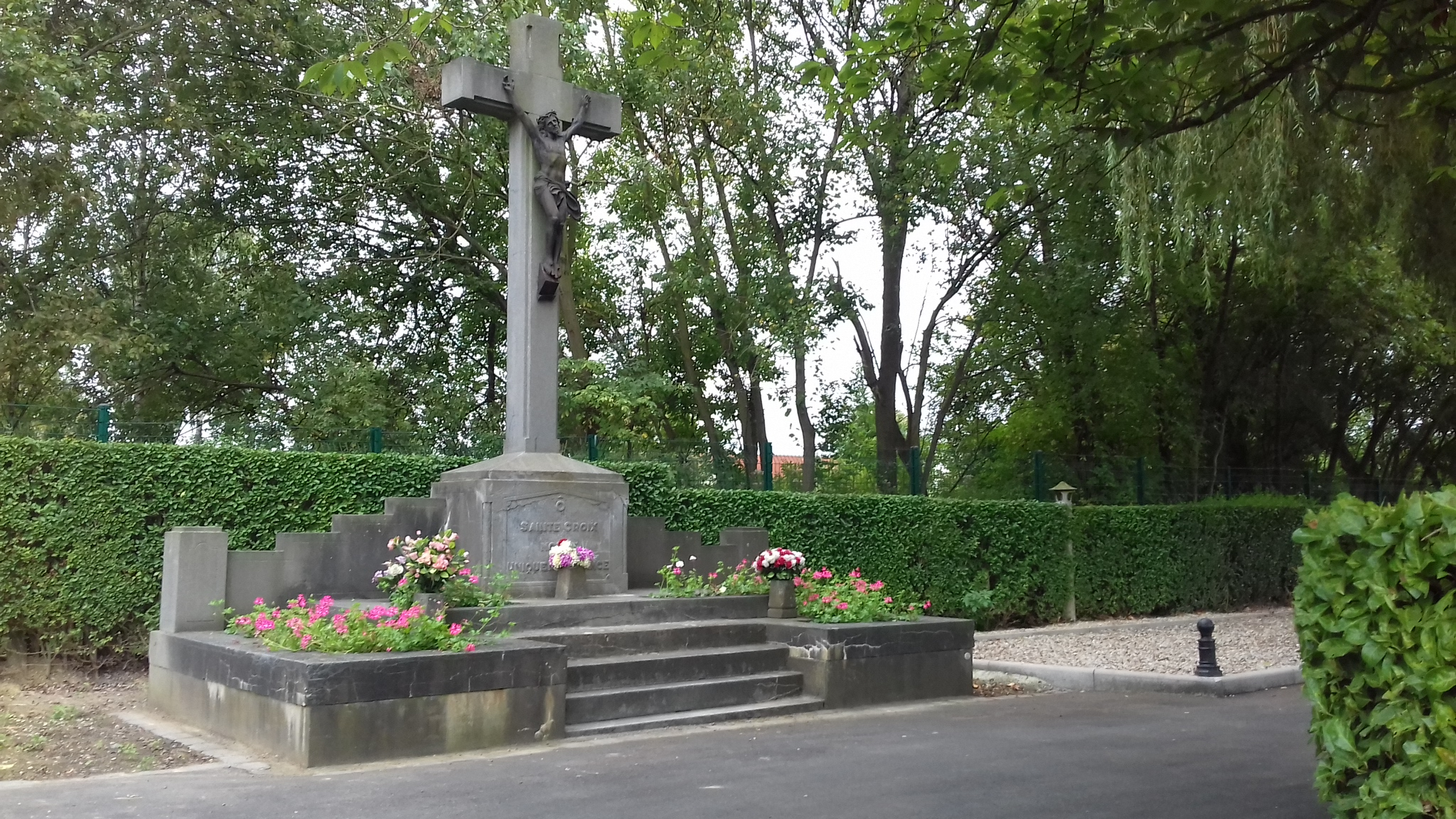 Calvaire du cimetière du Plomeux à Wasquehal, créait avec les dons des paroissiens des églises Saint-Nicolas et Saint-Clément de Wasquehal.